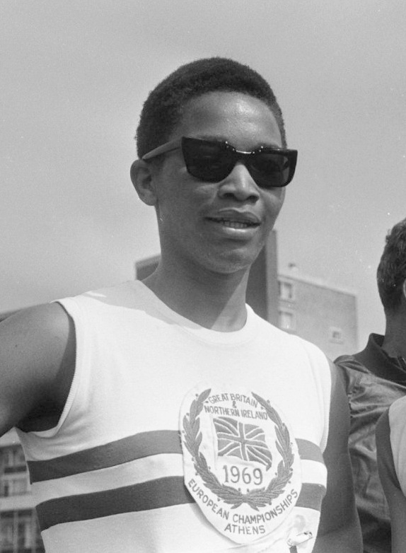 Dames atletiek Nederland tegen Engeland in Den Haag: Marilyn Neufville